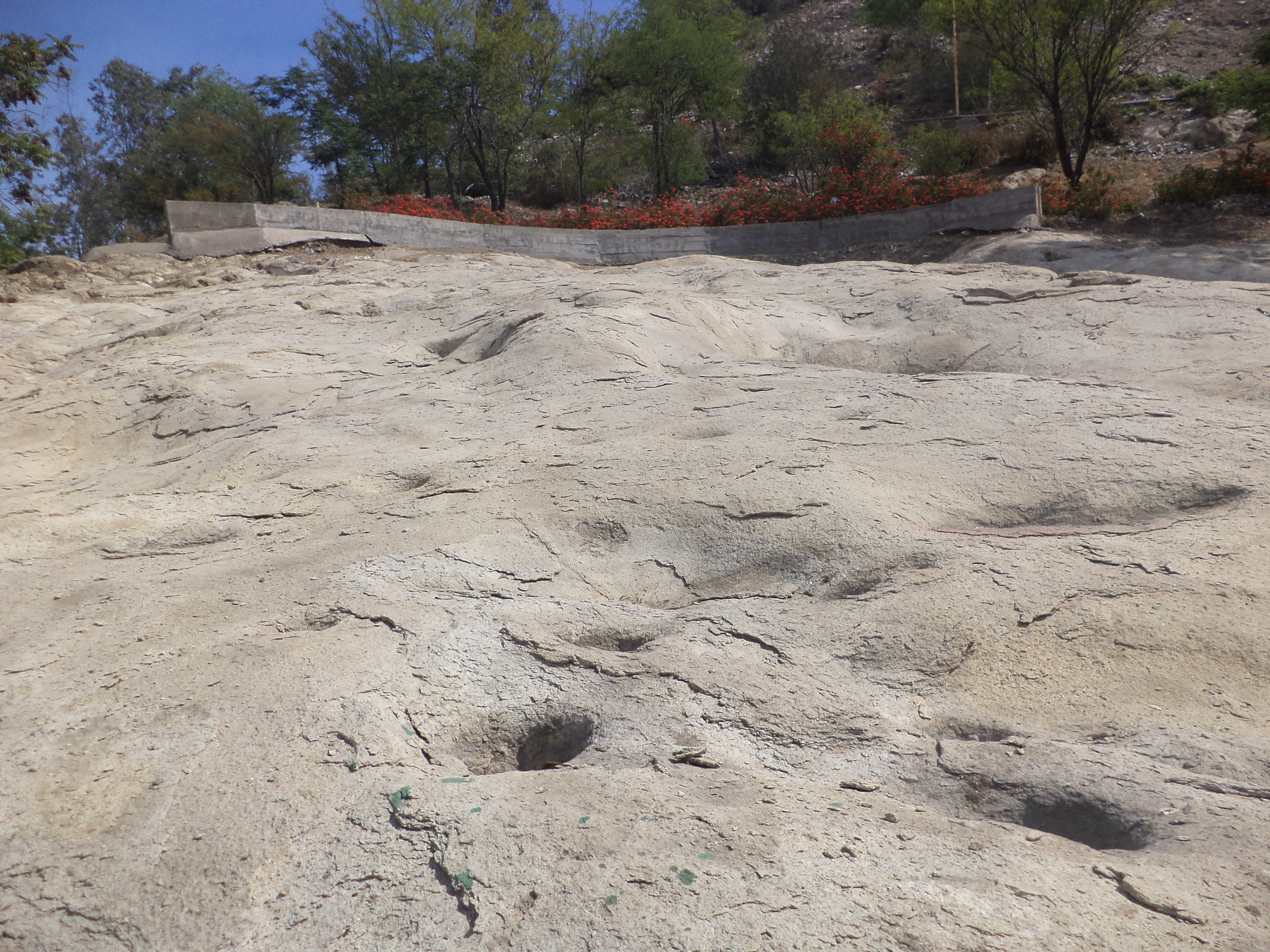 130 hendiduras con forma de "tacitas", que los indígenas picunches utilizaban como morteros en Cerro Blanco en Santiago de Chile.